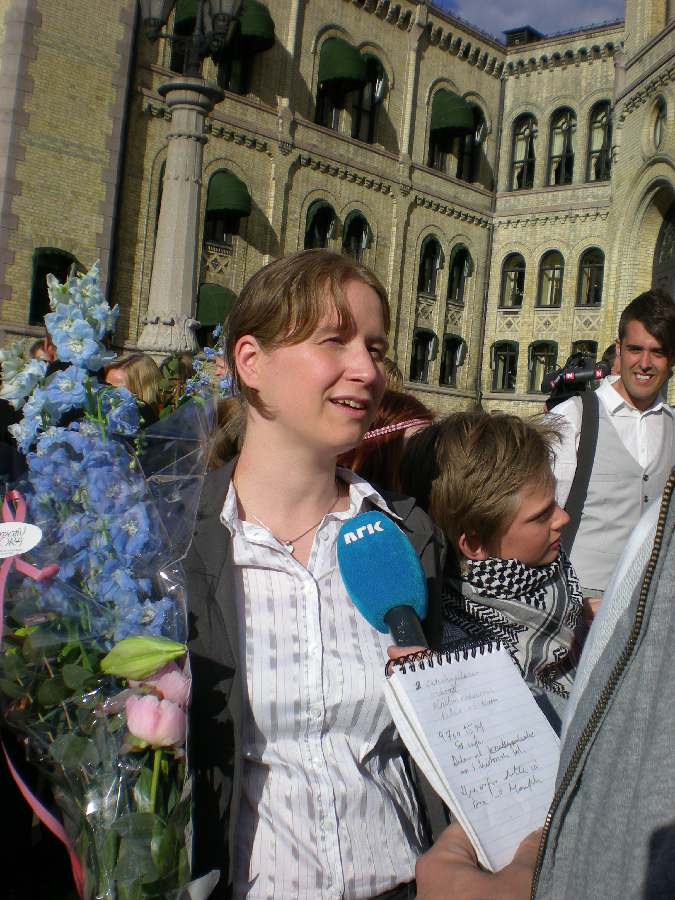 SVs Siri Hall Arnøy intervjues av NRK. Arnøy fremmet forslag om kjønnsnøytral ekteskapslov sammen med partifelle May Hansen i 2004. Foto: Marius Talmo / SV